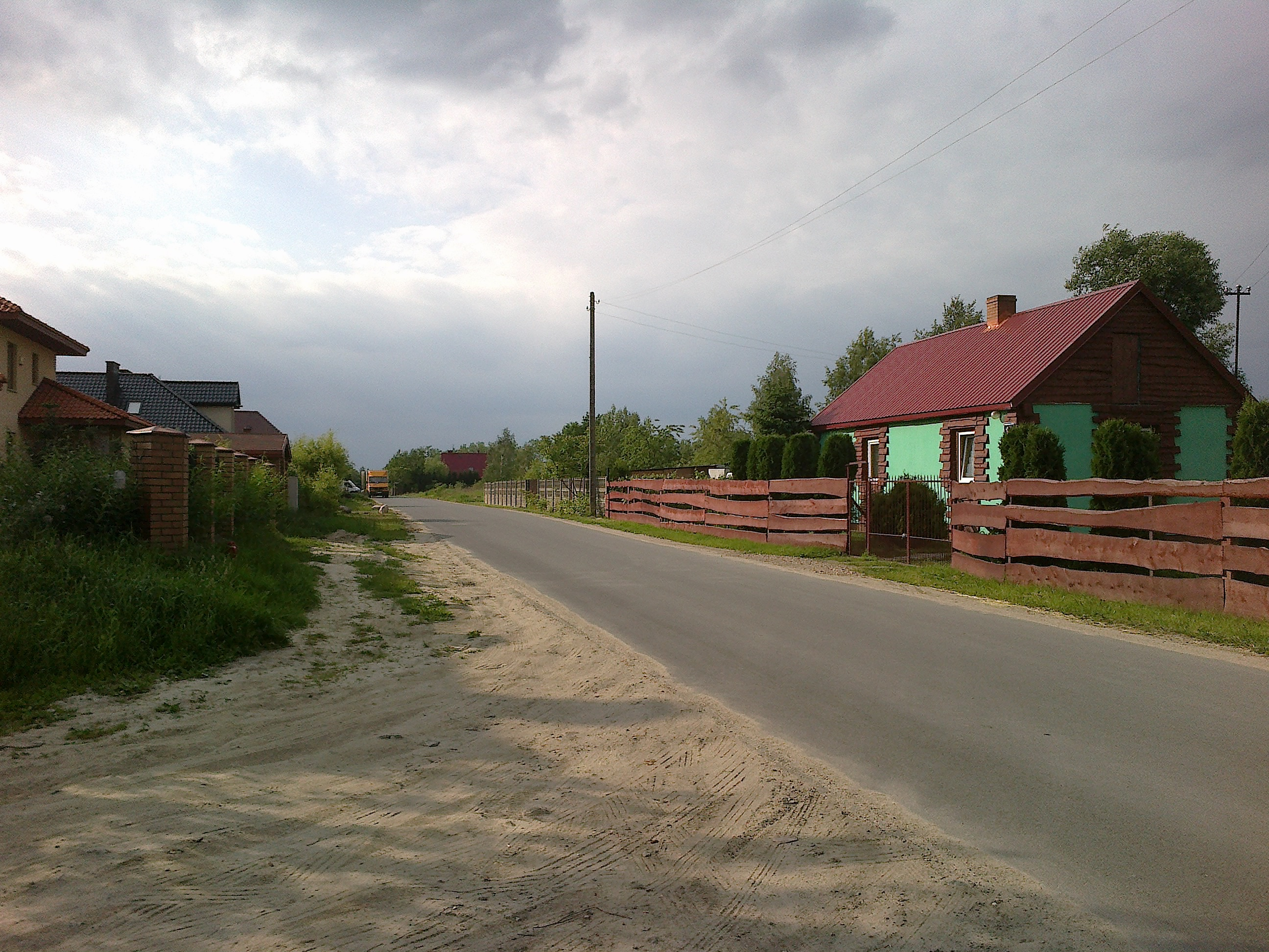 Wieś Wólka Kozodawska, ul. Herbacianej Róży